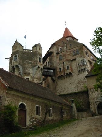 Hrad Pernštejn, Česká republika